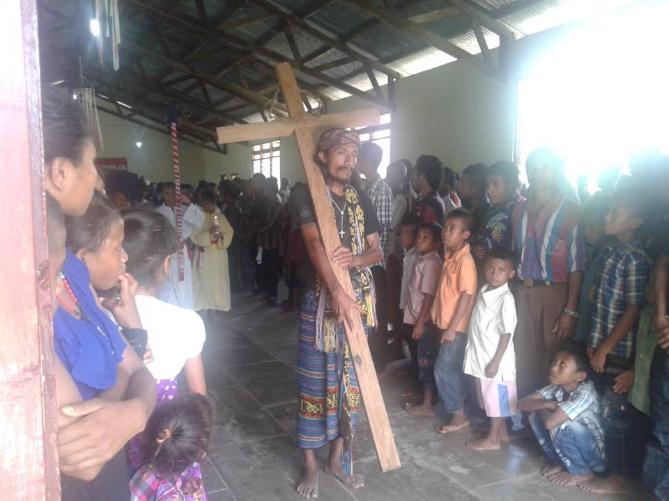 Leohito